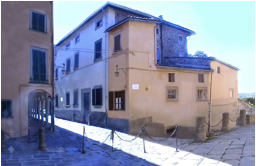 Ripresa fotografica di Palazzo Crudeli, da vicolo Crudeli. Poppi, 2008.